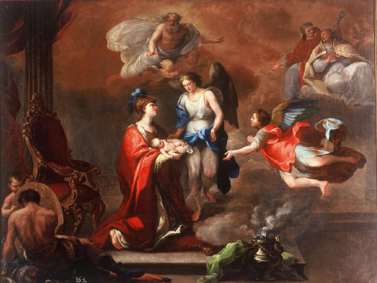 Representación alegórica del nacimiento del infante de España Carlos Clemente Antonio de Borbón (1771-1774), que fue el hijo primogénito del rey Carlos IV de España.